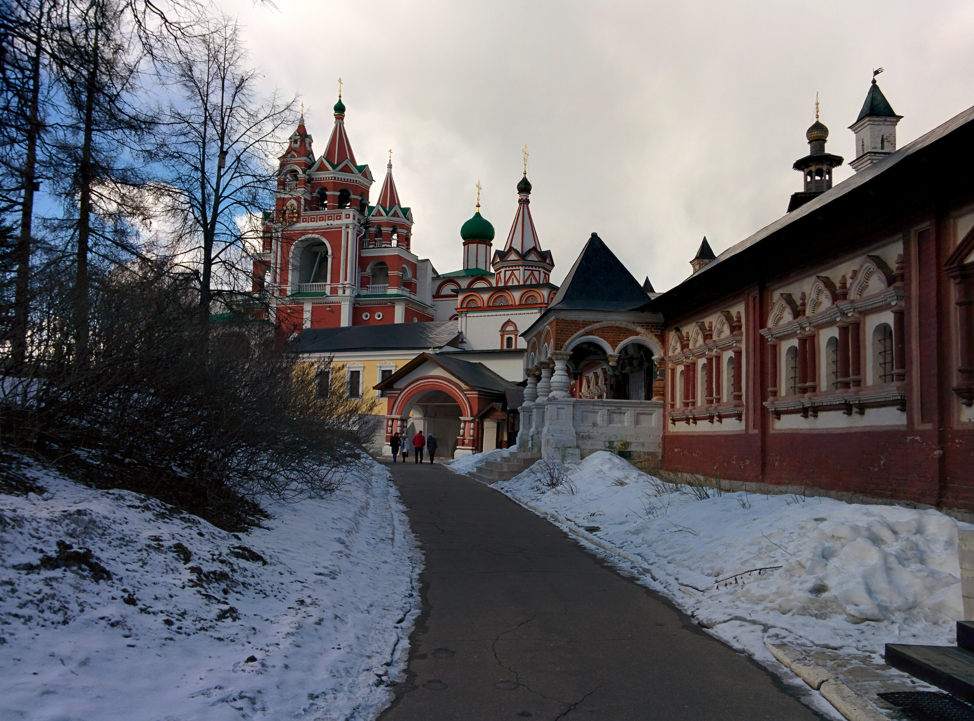 Колокольня (звонница) с церковью Сергия Радонежского: Саввинская слобода, Звенигород, Московская область